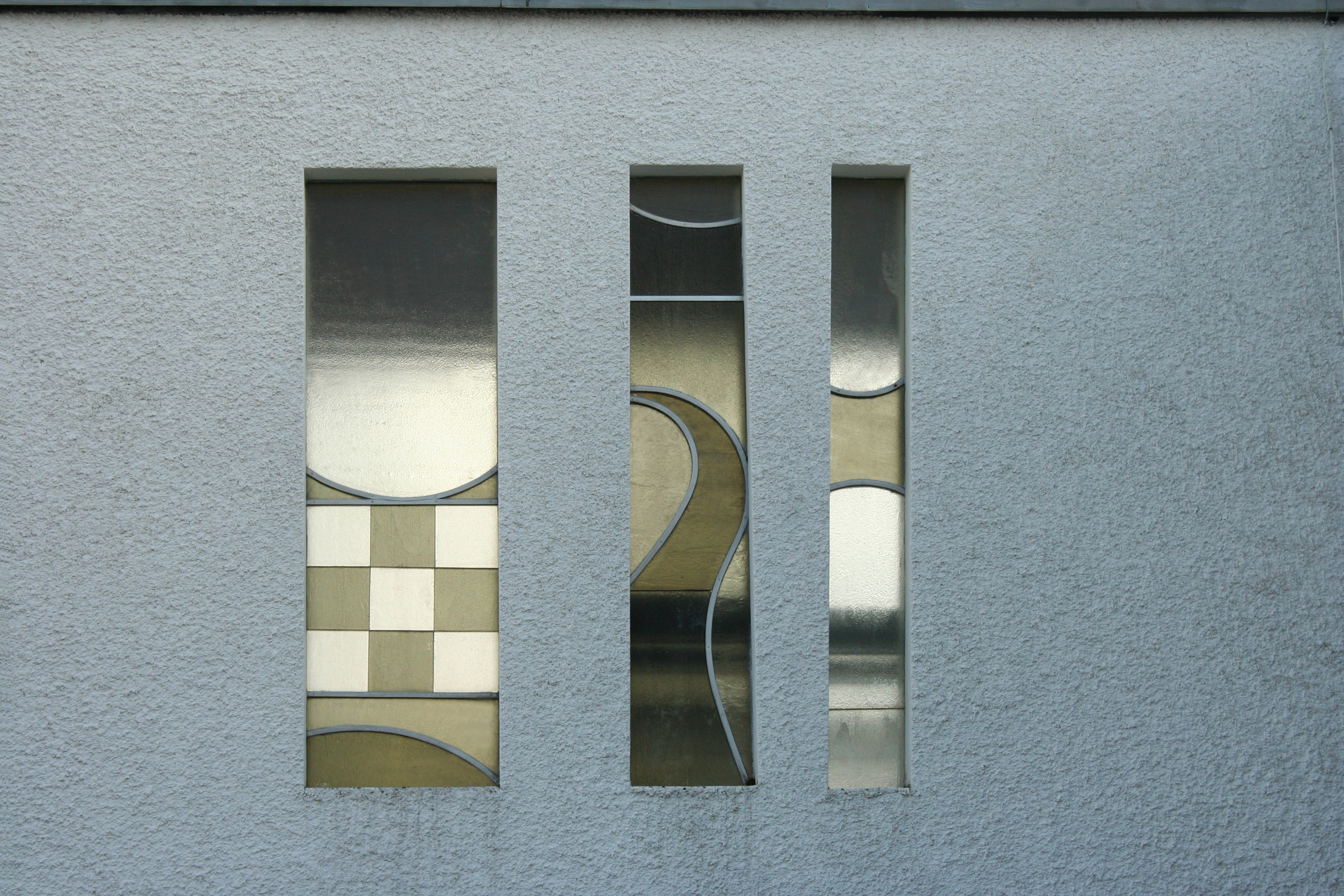 Römisch-katholische Pfarrkirche St. Michael Zollikerberg, Aussenfenster von Max Rüedi